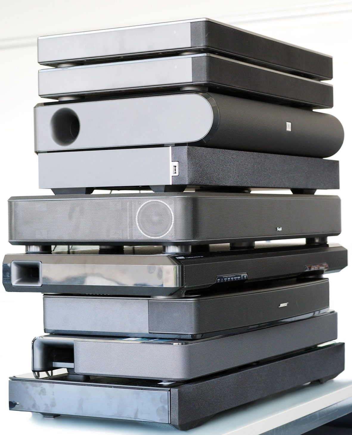 Gestapelte Soundplates von verschiedenen Anbietern